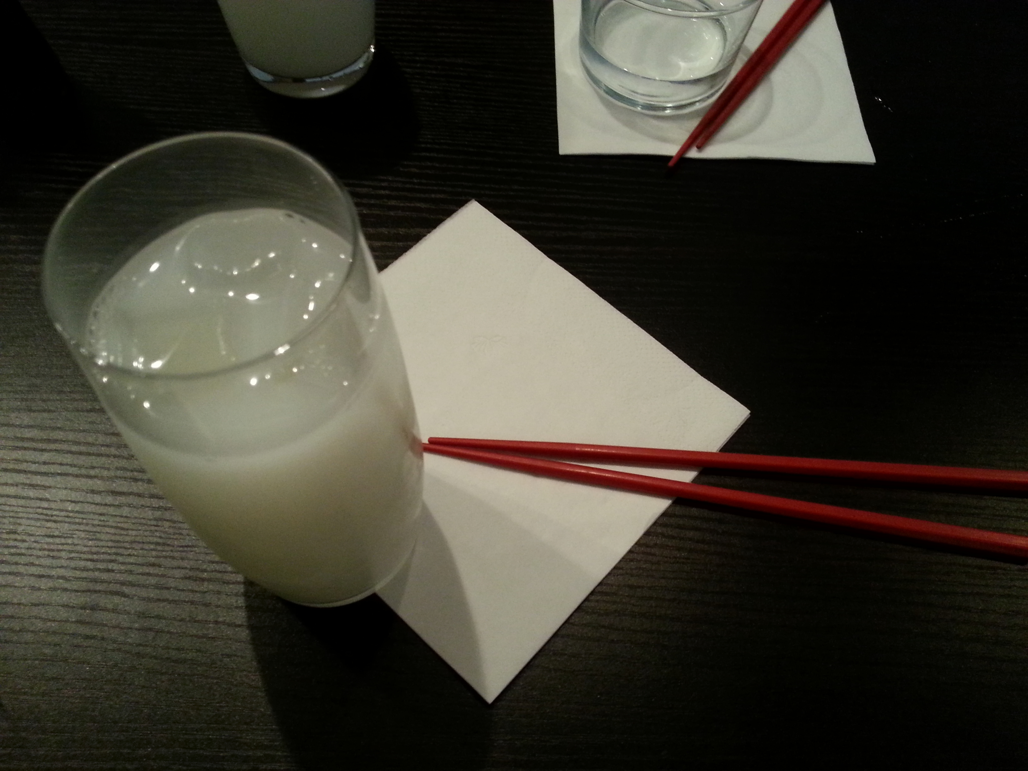 Un calpis dans un restaurant japonais en France (Okawali, Villeurbanne).